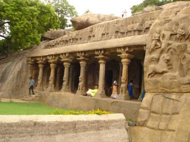 Krishna Mantapa, Mahbalipuram